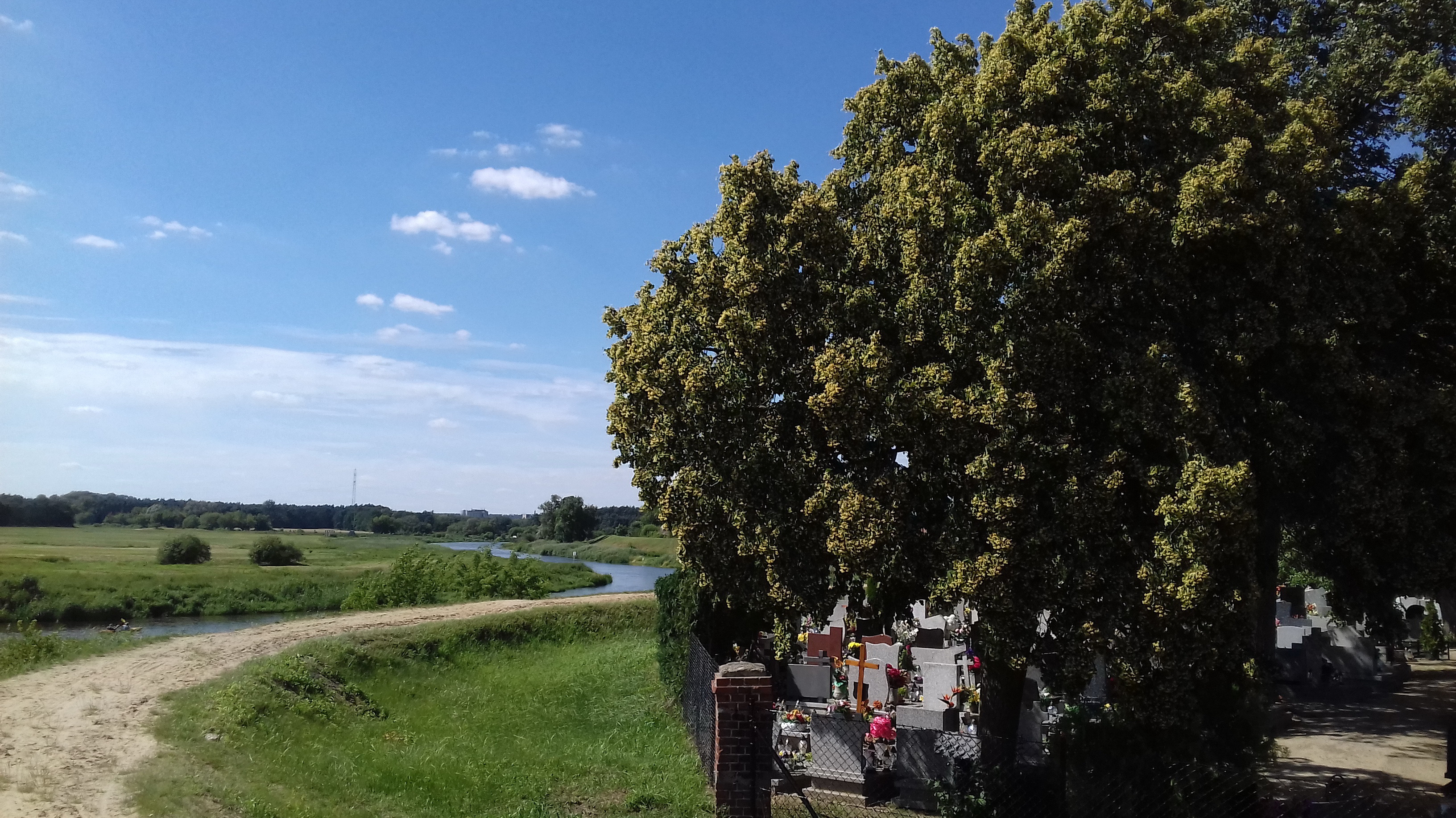 Szlak pieszy nr 186 (czerwony) w rejonie cmentarza przy sanktuarium Matki Bożej Wspomożenia Wiernych w Rogalinku, nad brzegiem Warty.